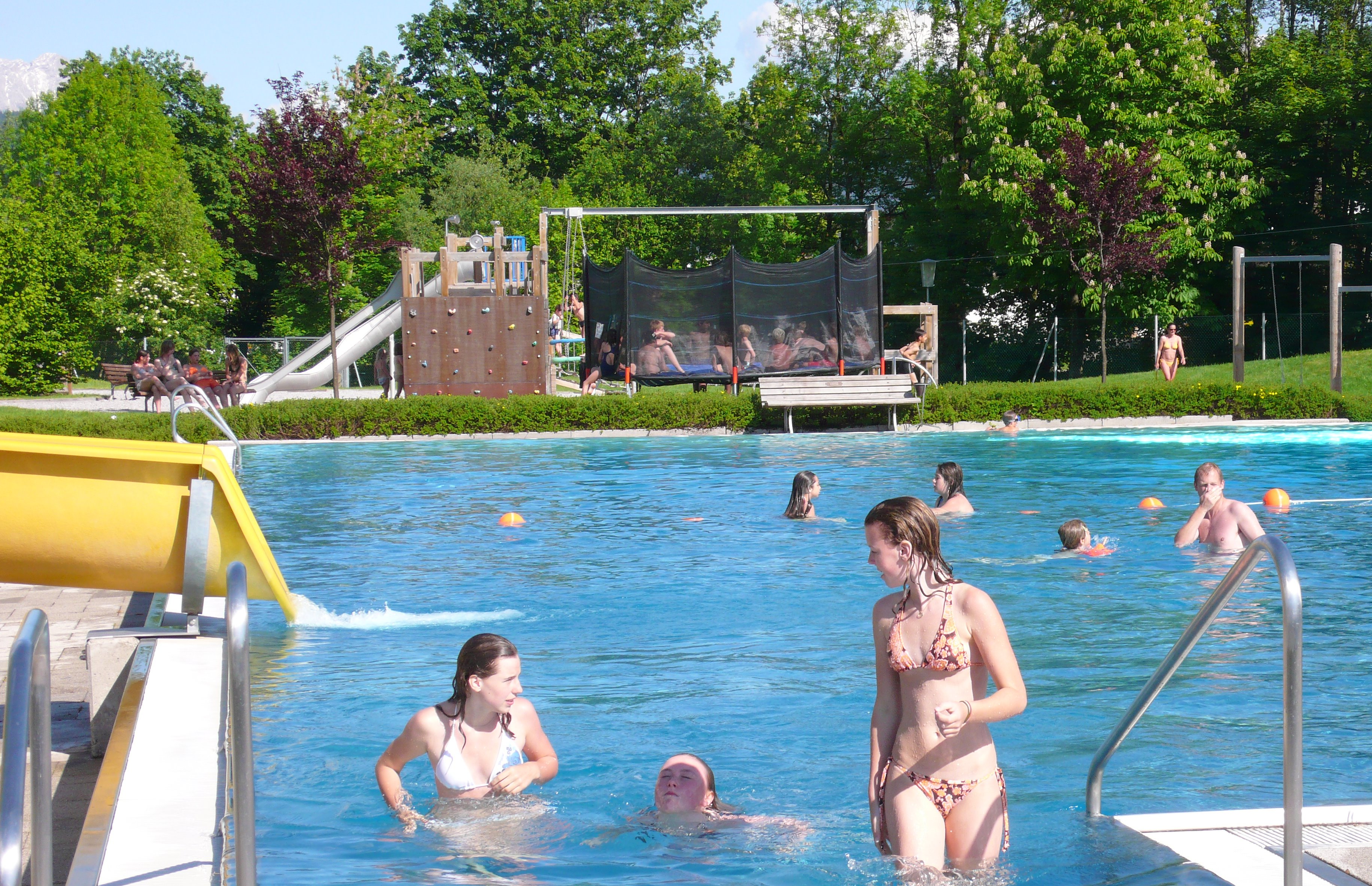 Panorama Badewelt